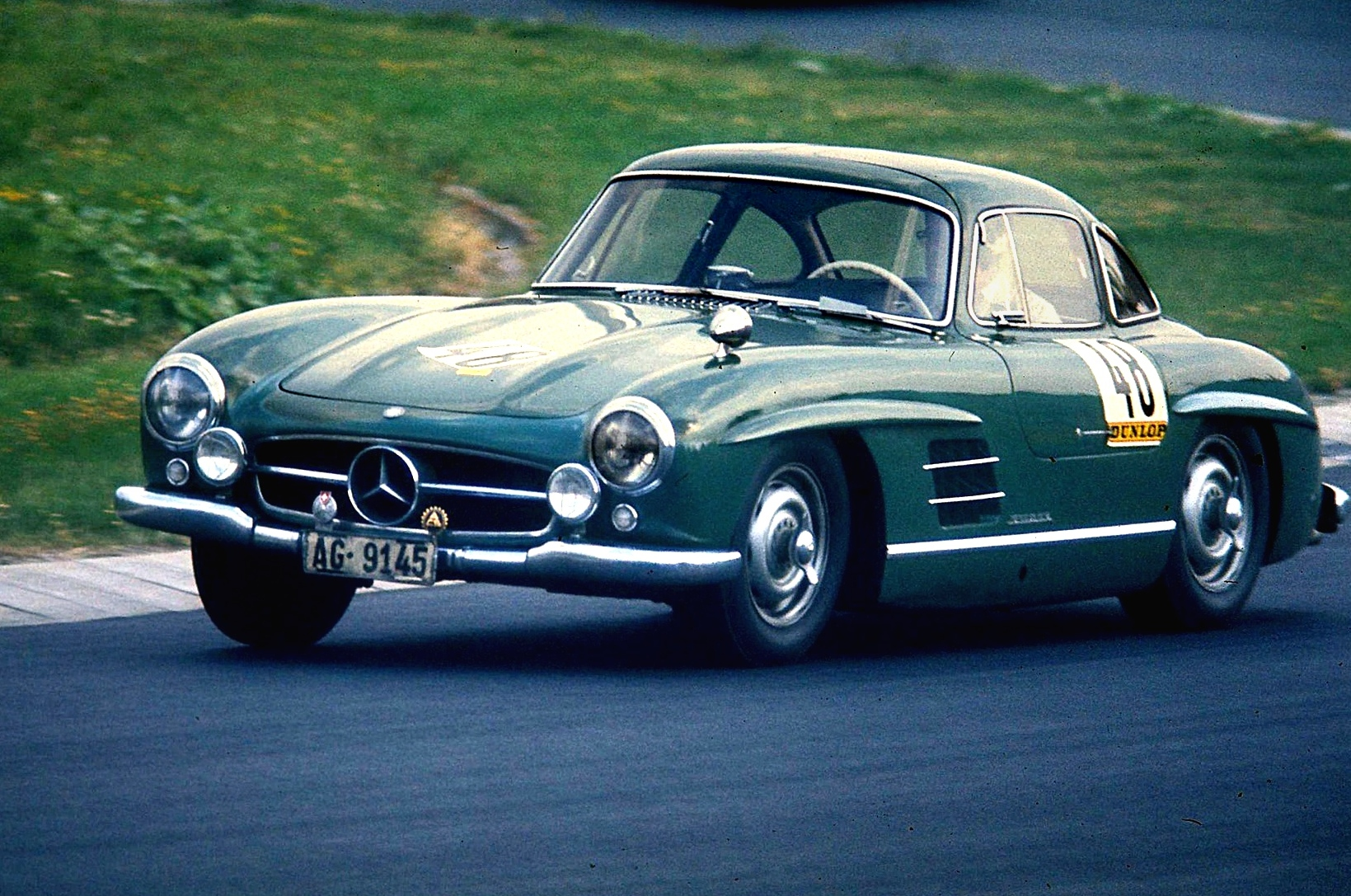 Mercedes-Benz 300 SL, Baujahr 1955, in der Südkehre des Nürburgrings